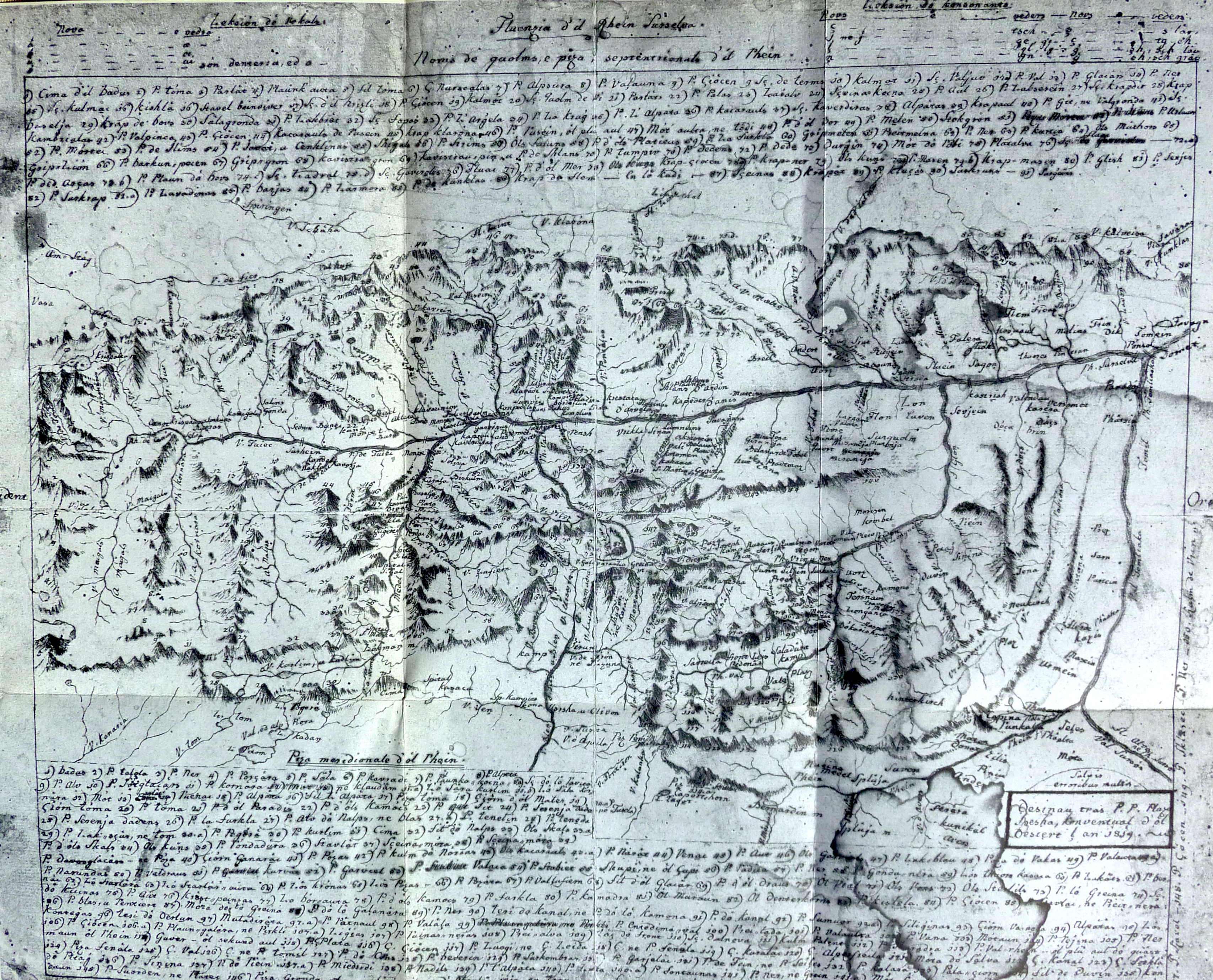 Karte der Surselva, vollendet am 18. Oktober 1819 in Trun, 39 x 31 cm. Original im Klostermuseum Disentis